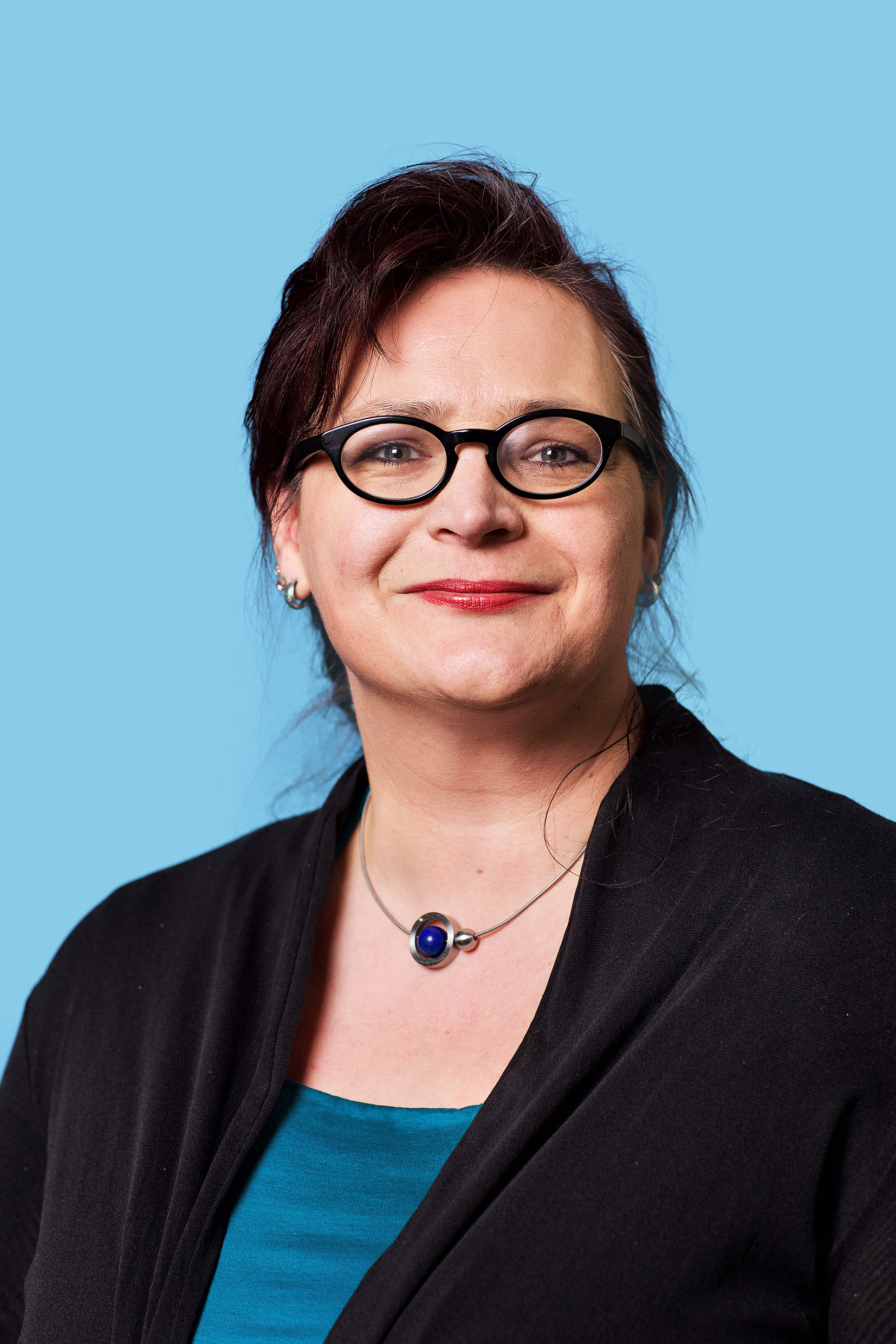 13 februari 2016. Tweede Kamerlid voor de Partij van de Arbeid. Foto: Lex Draijer.